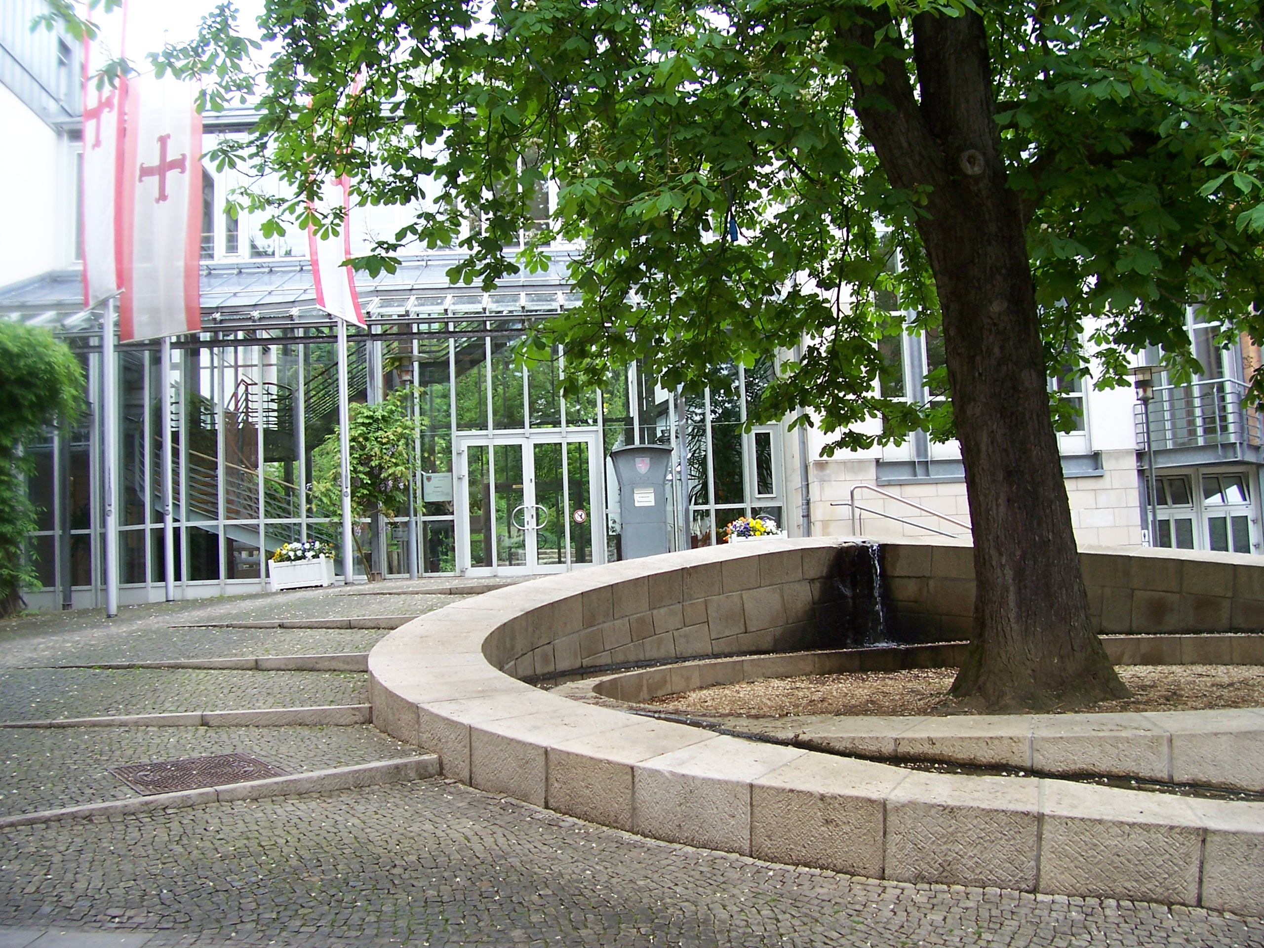 Das Bild zeigt den Haupteingang des Rathauses der Stadt Bad Pyrmont.